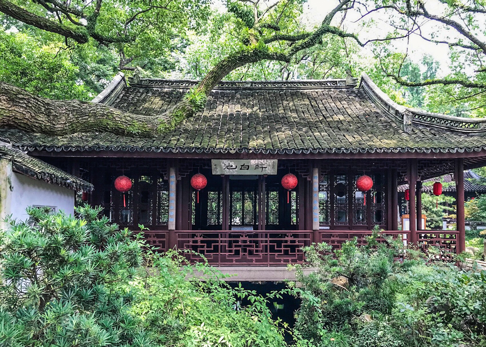 中文（中国大陆）: 醉白池 岳阳街道人民南路64号